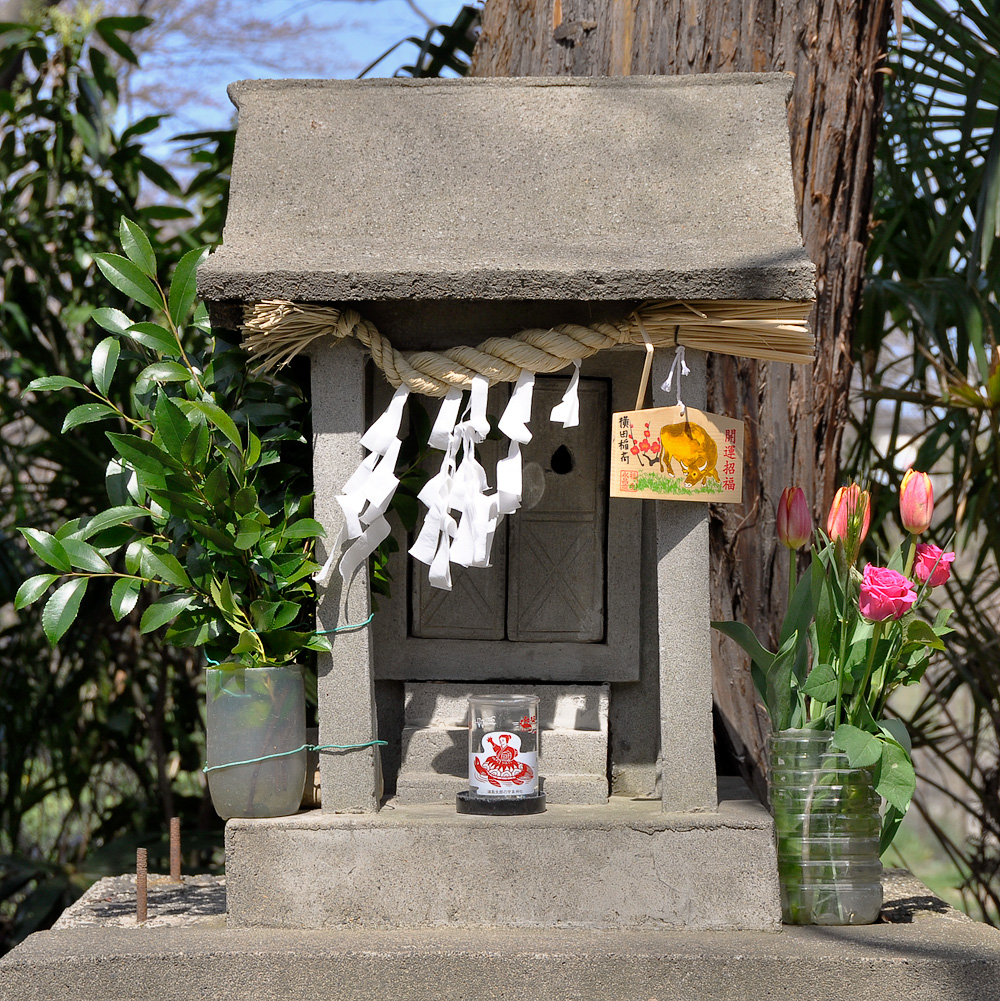 Hokora 祠